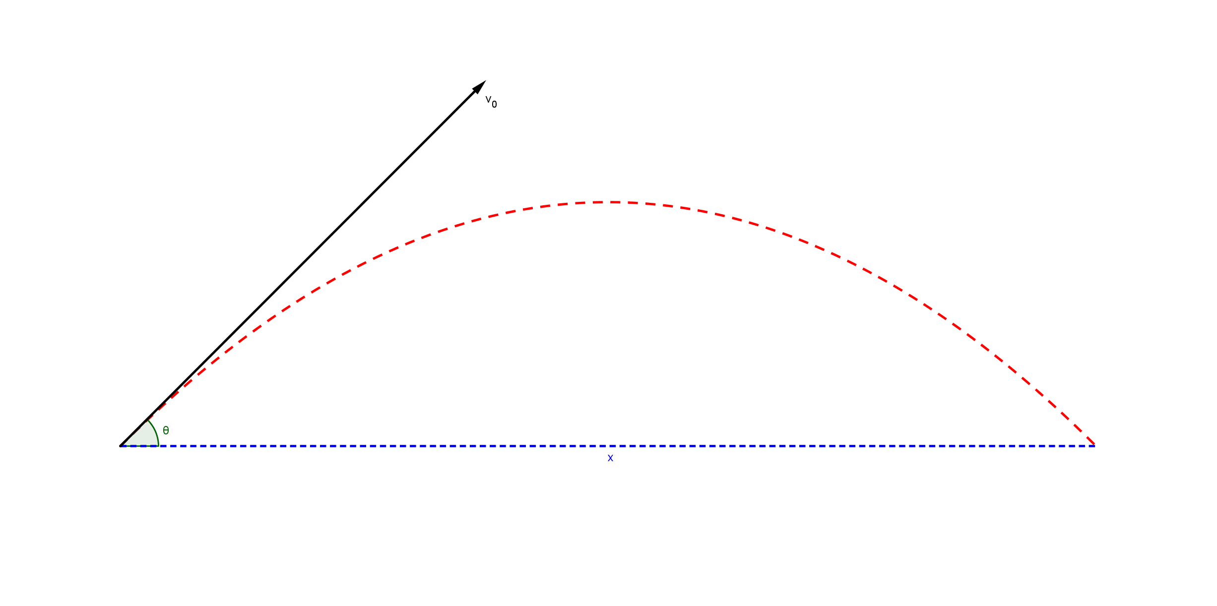 Grafico di una gittata